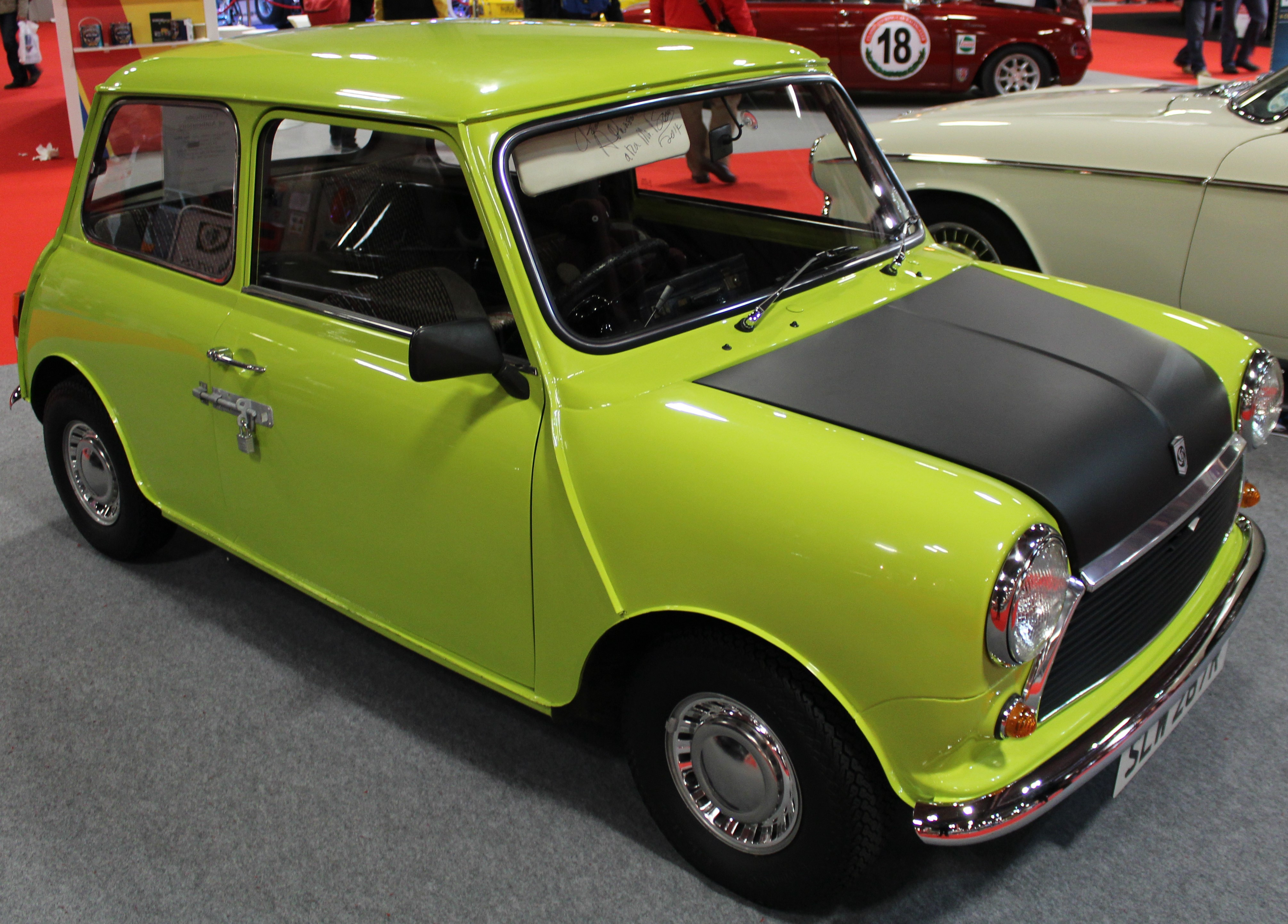 Mr Beans Mini